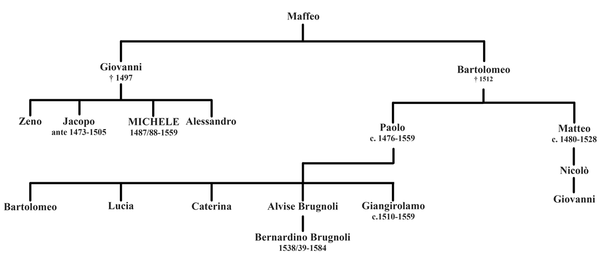 Albero genealogico della famiglia dell'architetto veronese Michele Sanmicheli Tratto da: Paul Davis, David Hemsoll - Michele Sanmicheli